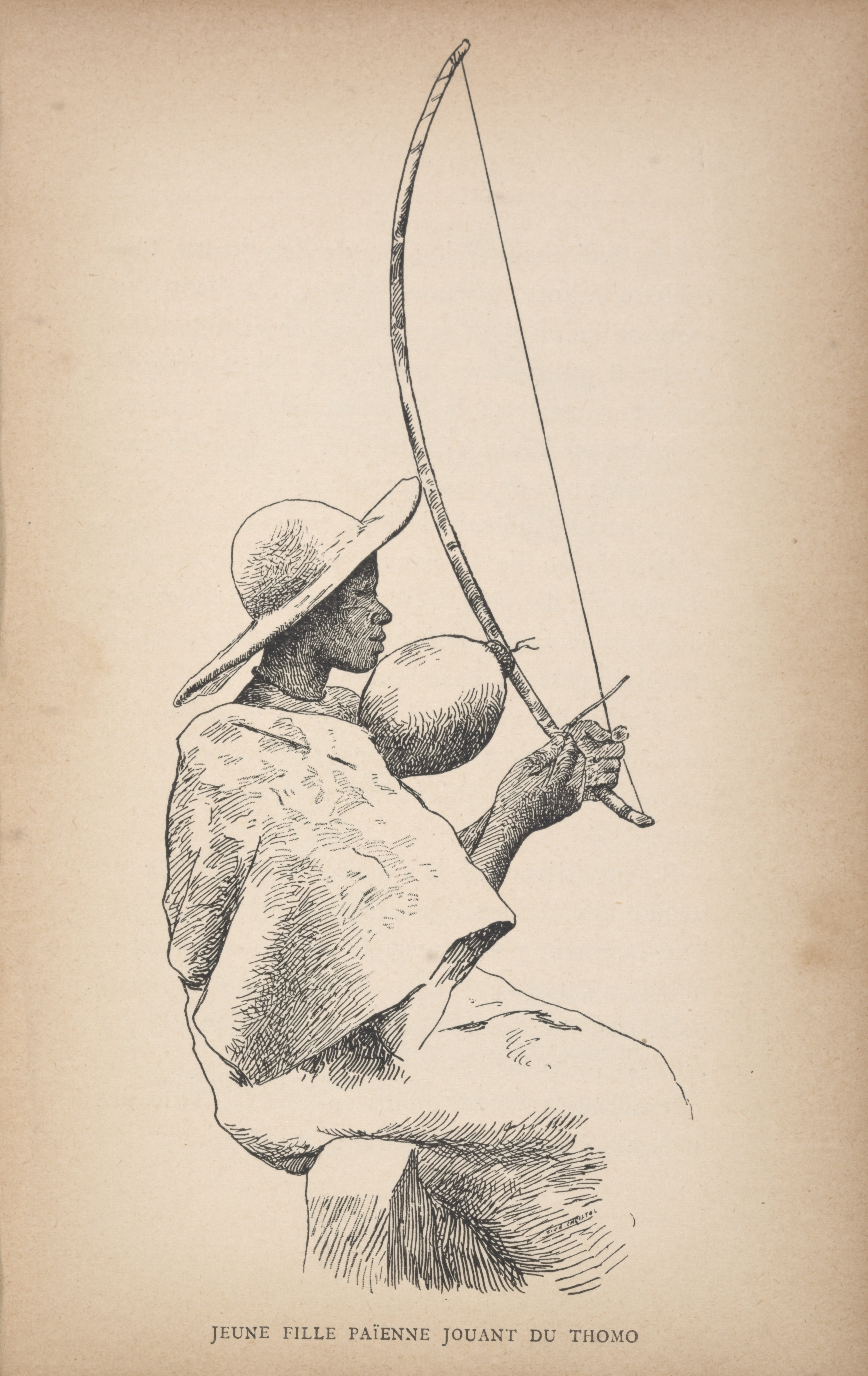 Lesotholainen tyttö soittamassa Thomoa.